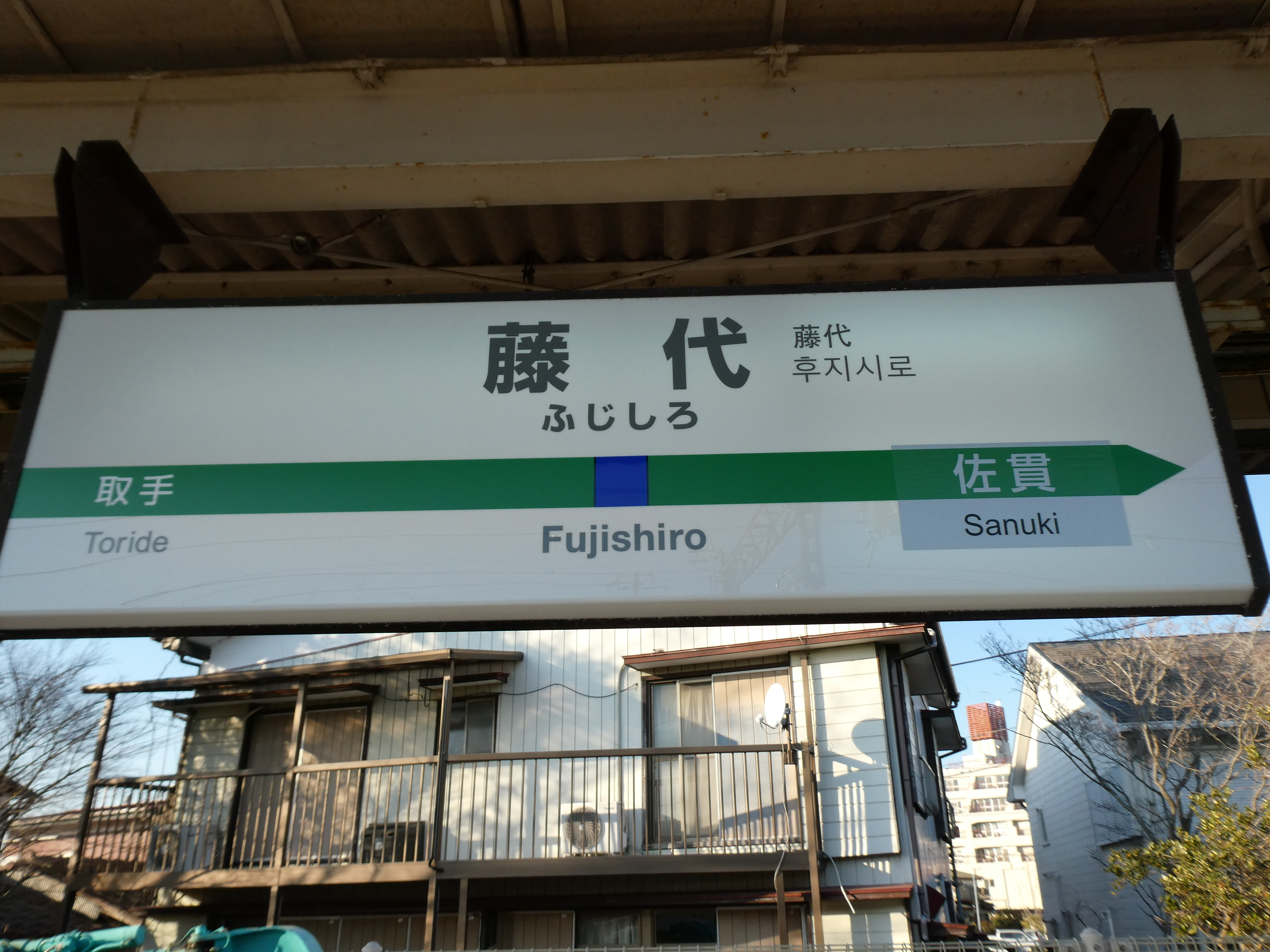 隣駅が佐貫時代のもの